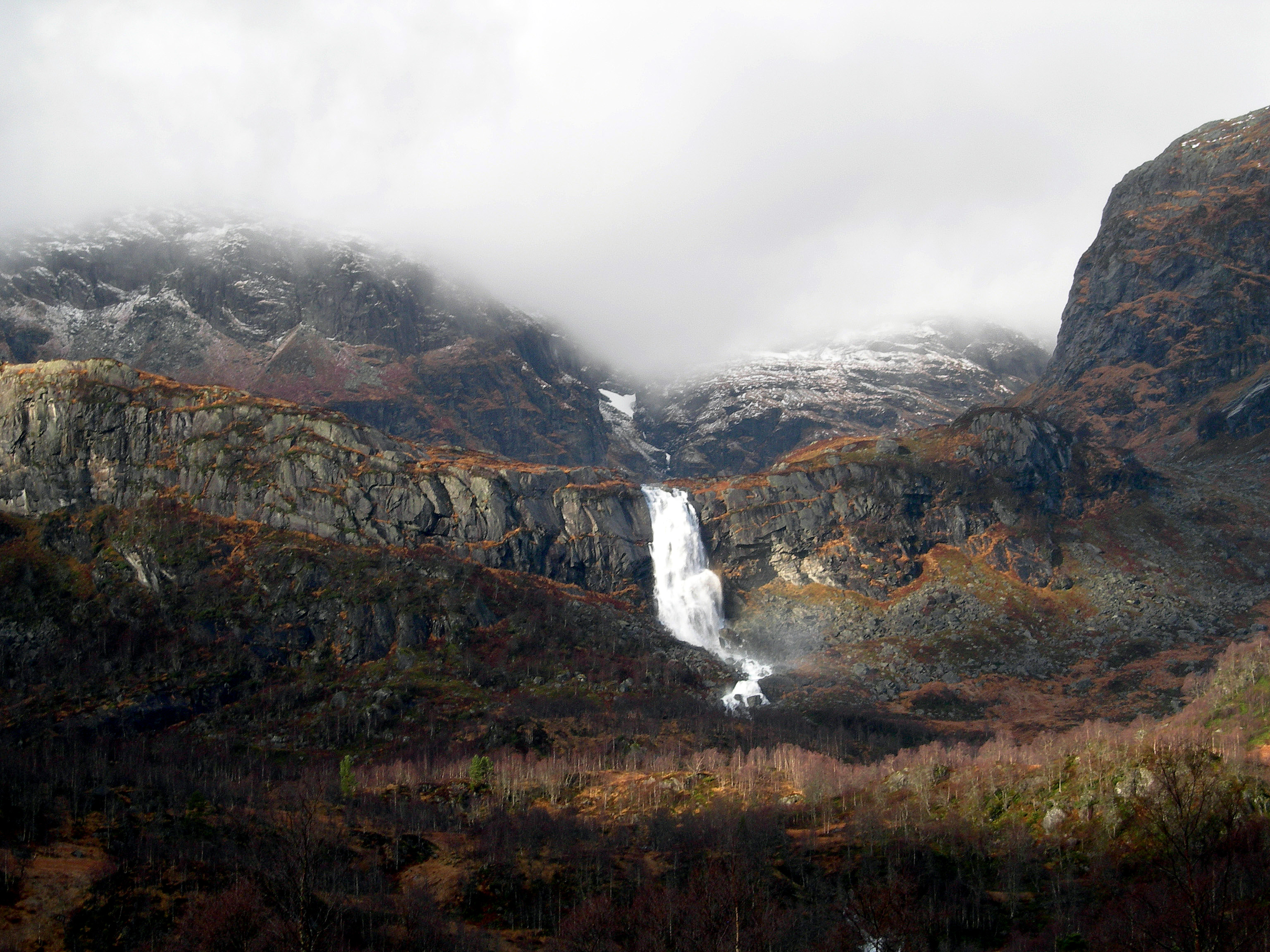 Fossdalsfossen i Åbødalen